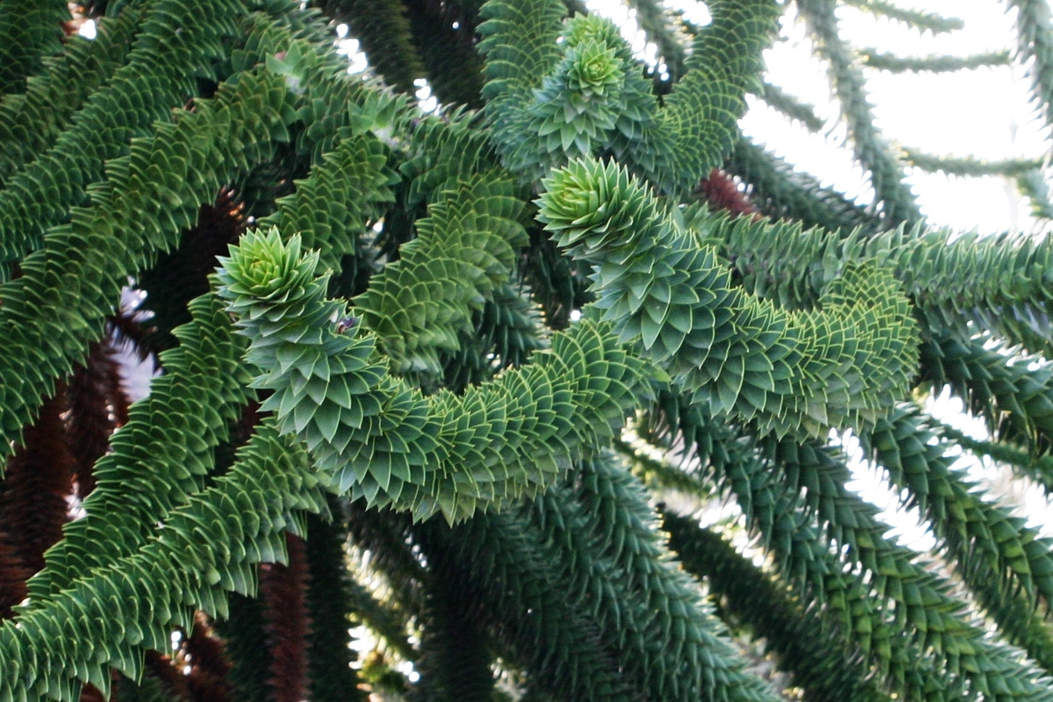 Äscht vun engem Afebam vun no gesinn.